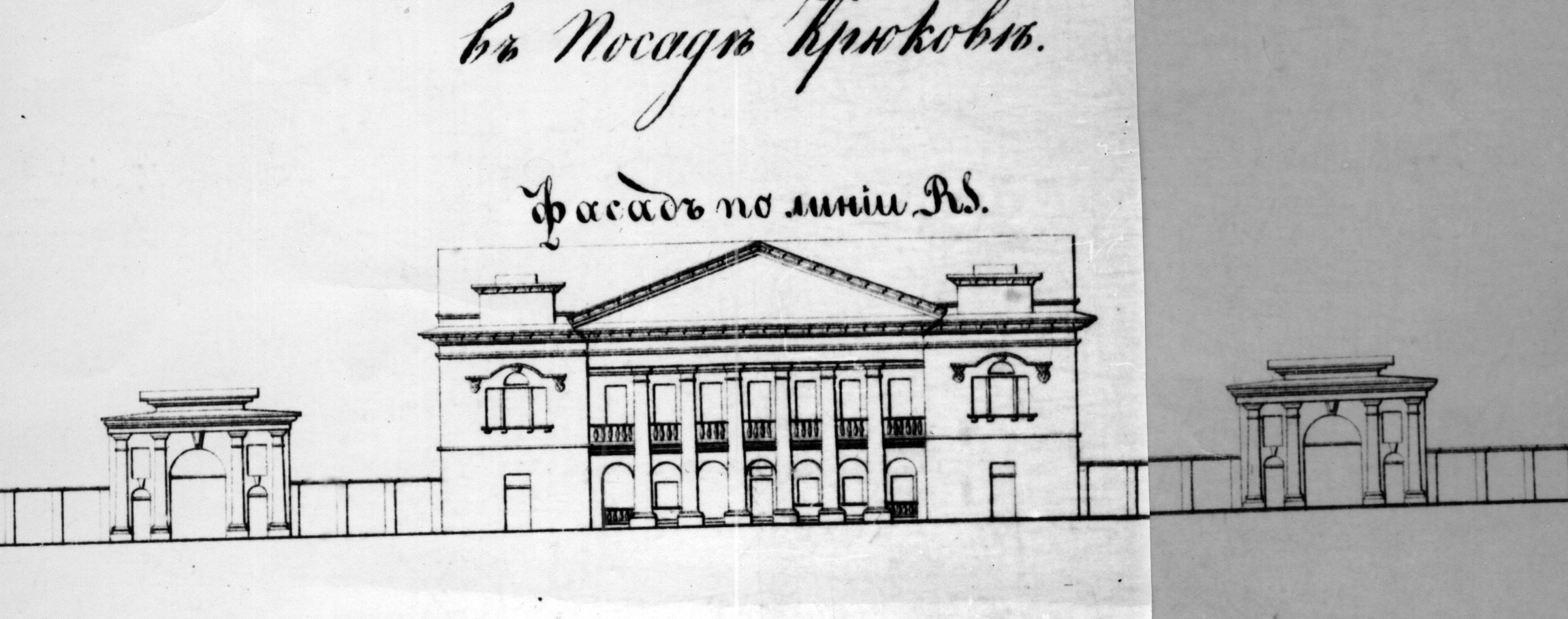 Ескіз будівель інтендантських складів у Крюкові (Кременчуцька комісаріатська комісія)